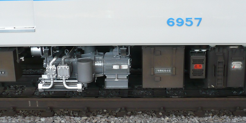 西武6000系の空気圧縮機